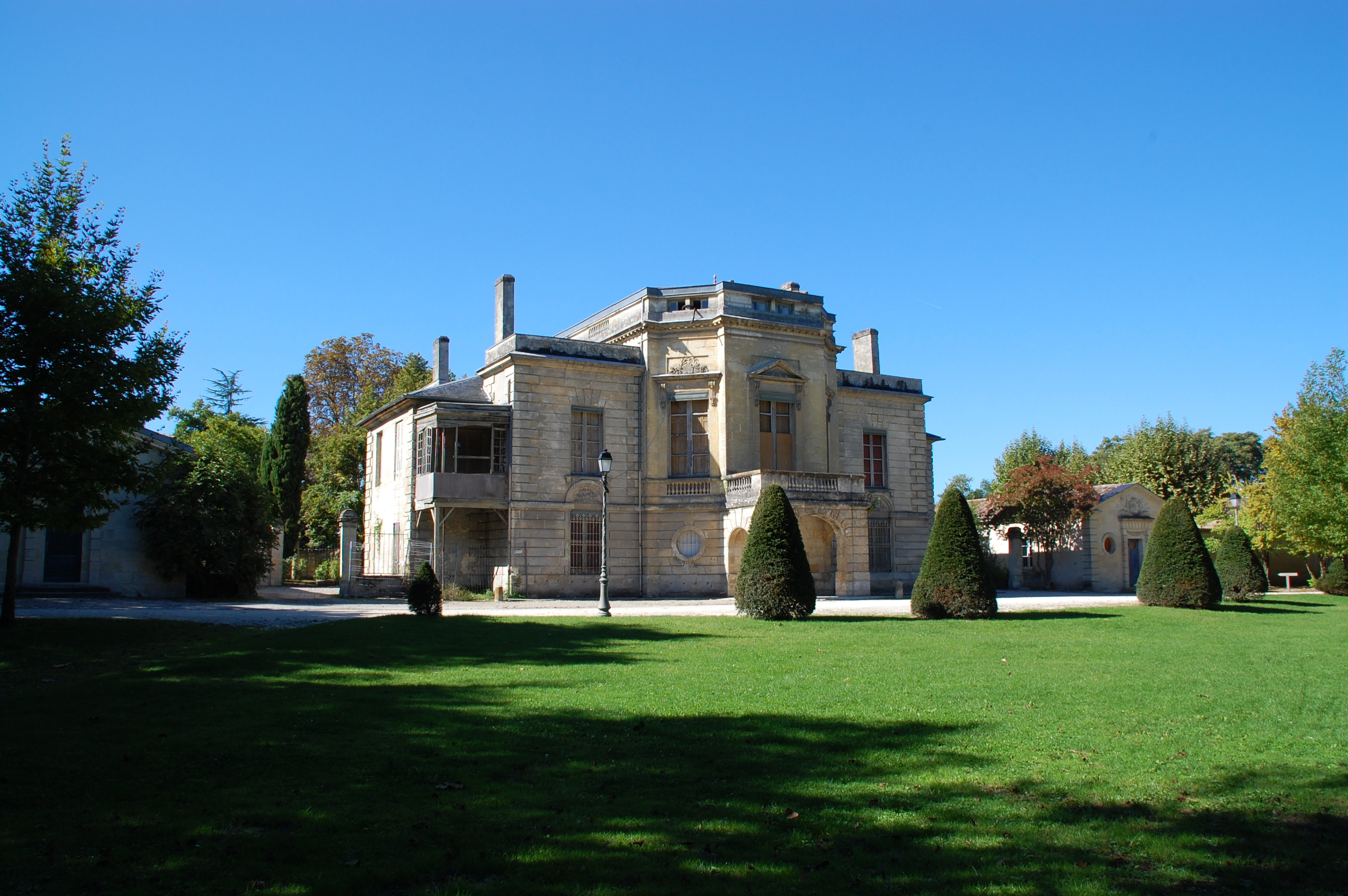 Castel d'Andorte (Inscrit) .